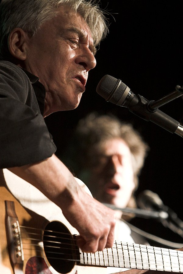 Cseh Tamás és Másik János